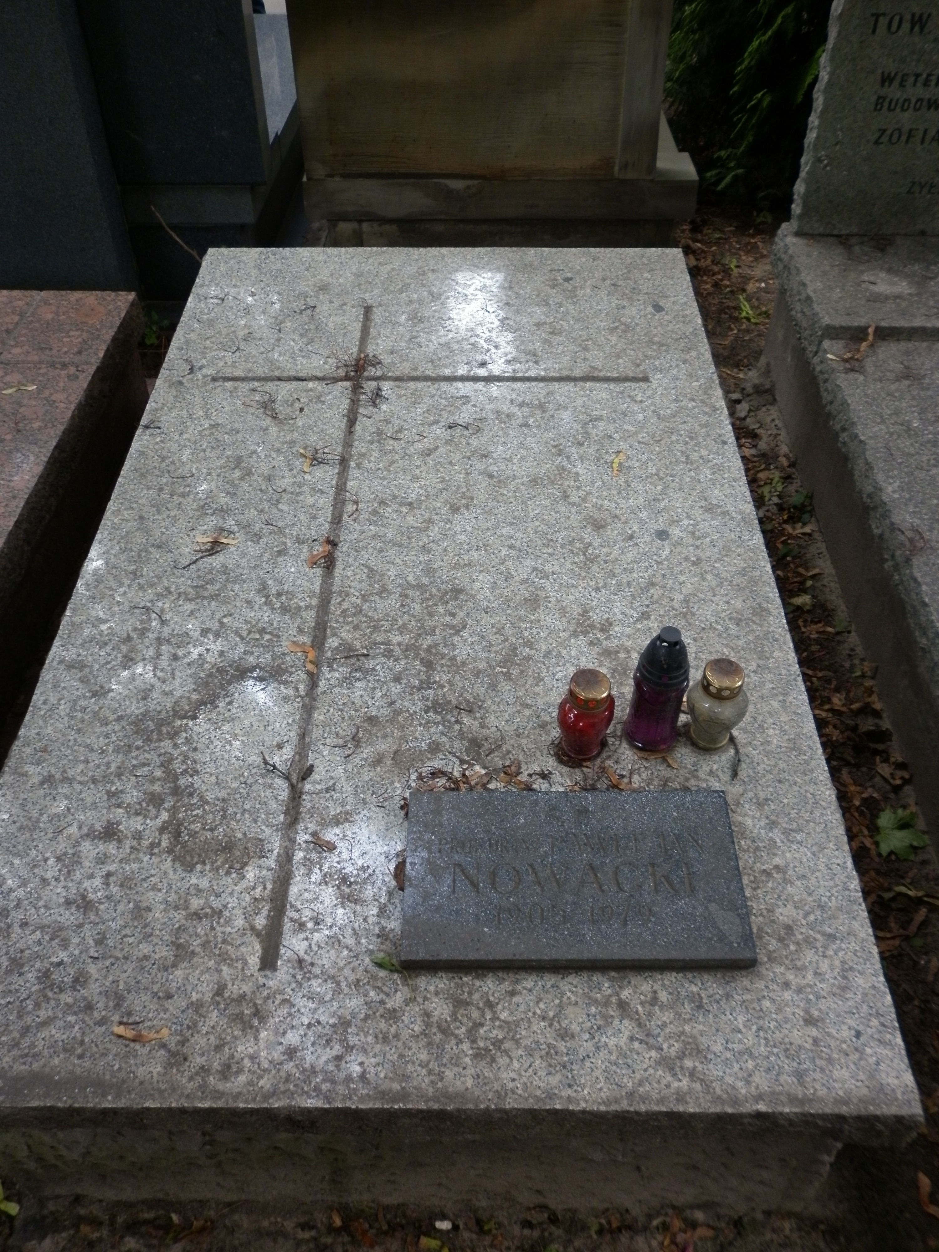 Grób Andrzeja Krasickiego na Cmentarzu Wojskowym na Powązkach